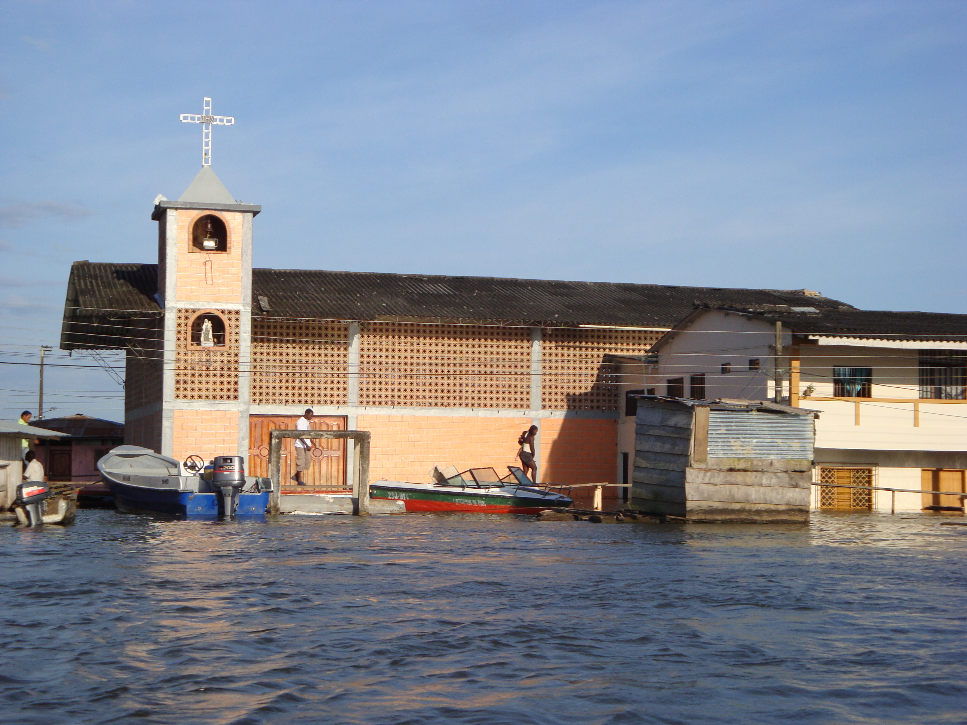 Aspecto exterior de la iglesia de Riosucio, Chocó, durante una inundación.